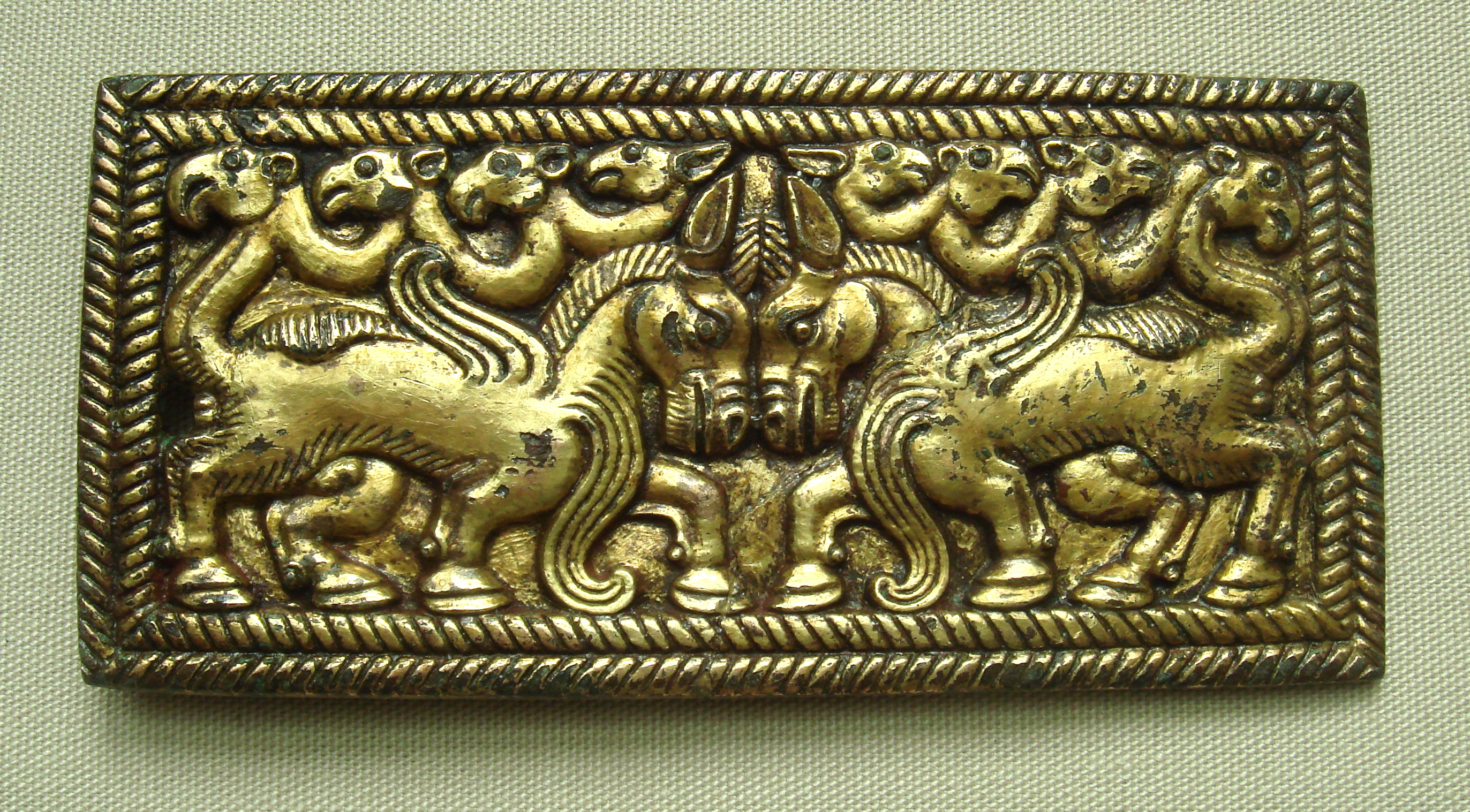 Belt Buckle Ordos 3-1 Century BCE